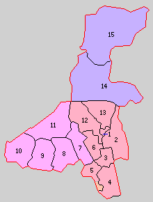 佐賀県小城郡の町村制時点の町村。